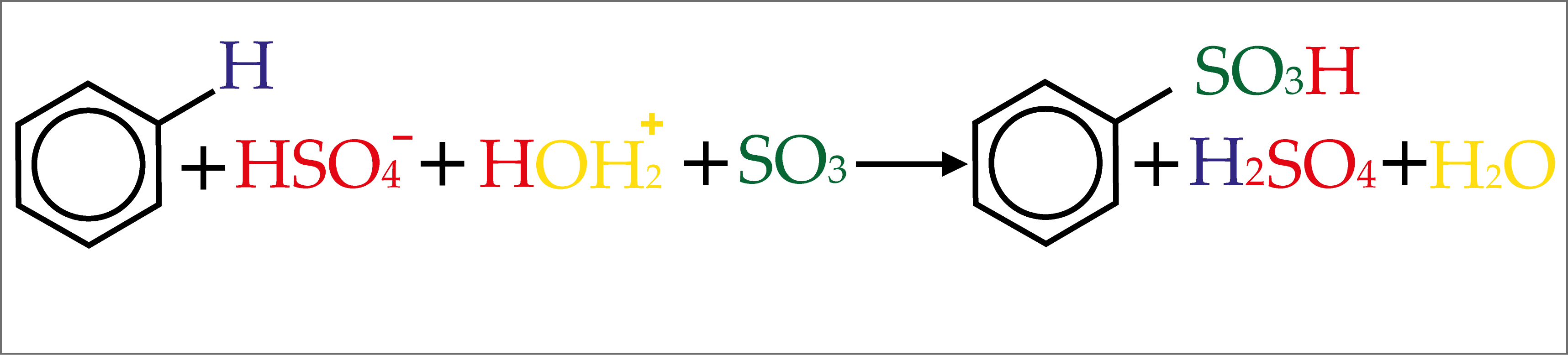 Reação resumida universal do do processo de sulfonação aromática eletrolítica